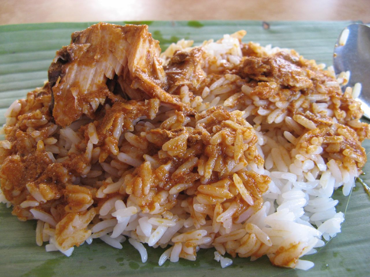 famous 'mak ngah nasi dagang'